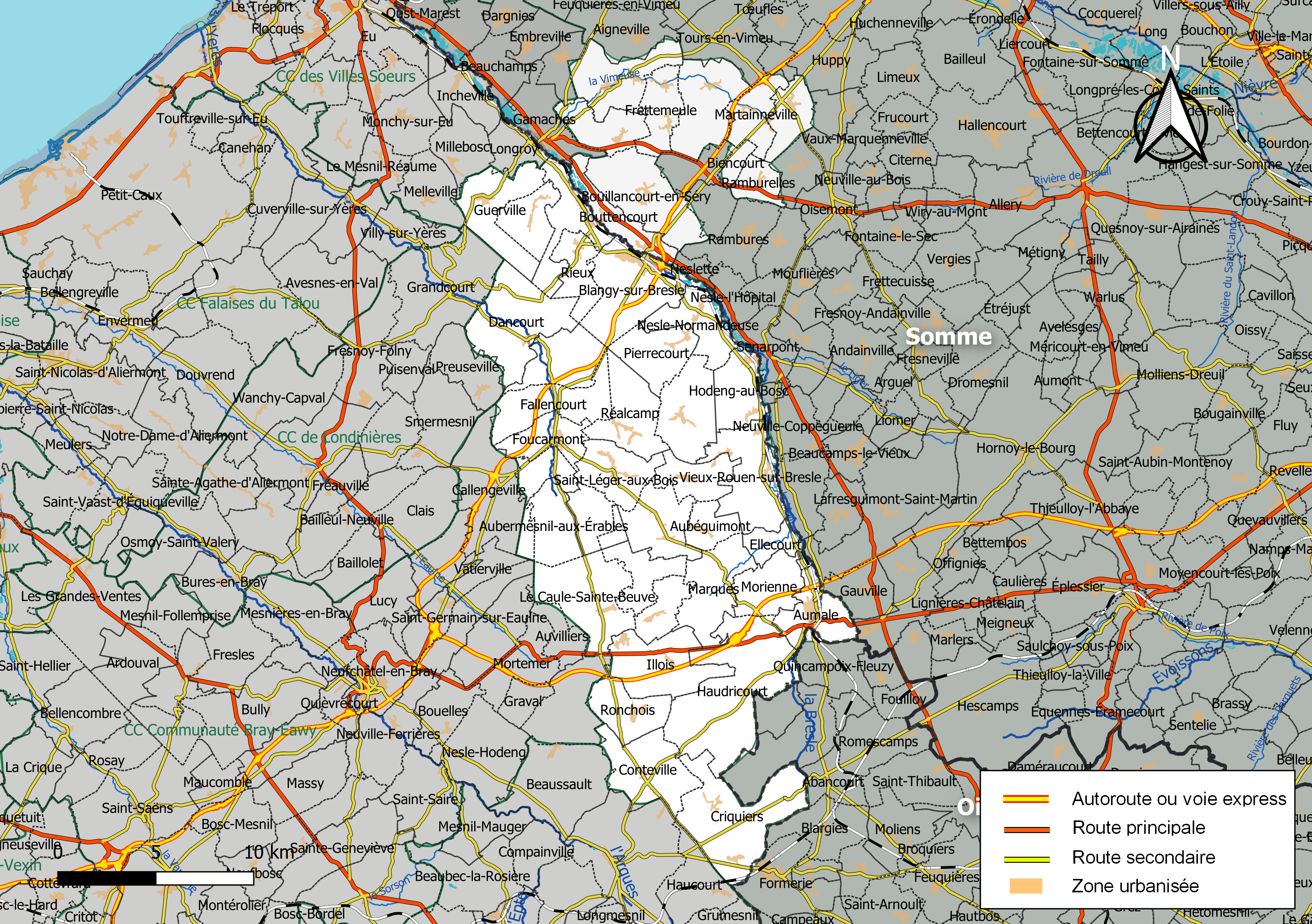 Carte géographique de la Communauté de communes interrégionale Aumale - Blangy-sur-Bresle, département de la Seine-Maritime, France. Composition au 1er janvier 2019.